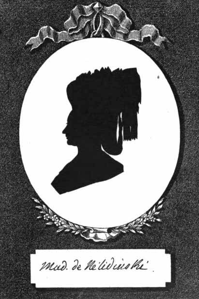 Анастасия Николаевна Нелединская-Мелецкая (1754-1803), дочь графа Н.А.Головина и А.С.Лопухиной, была замужем (2-я жена) за А.Ю.Нелединским-Мелецким (1729-1804), мачиха поэта Ю.А.Нелединского-Мелецкого. До замужества родила от 16 летнего Степана Сергеевича Ланского (1760-1813) сына Александра Степановича Лавинского (1776-1844), после рождения он получил права потомственного дворянства; затем была любовница Н.В.Репнина; после замужества - С.П.Румянцева (1755-1838), от него было три дочери, носящих фамилию Кагульских.